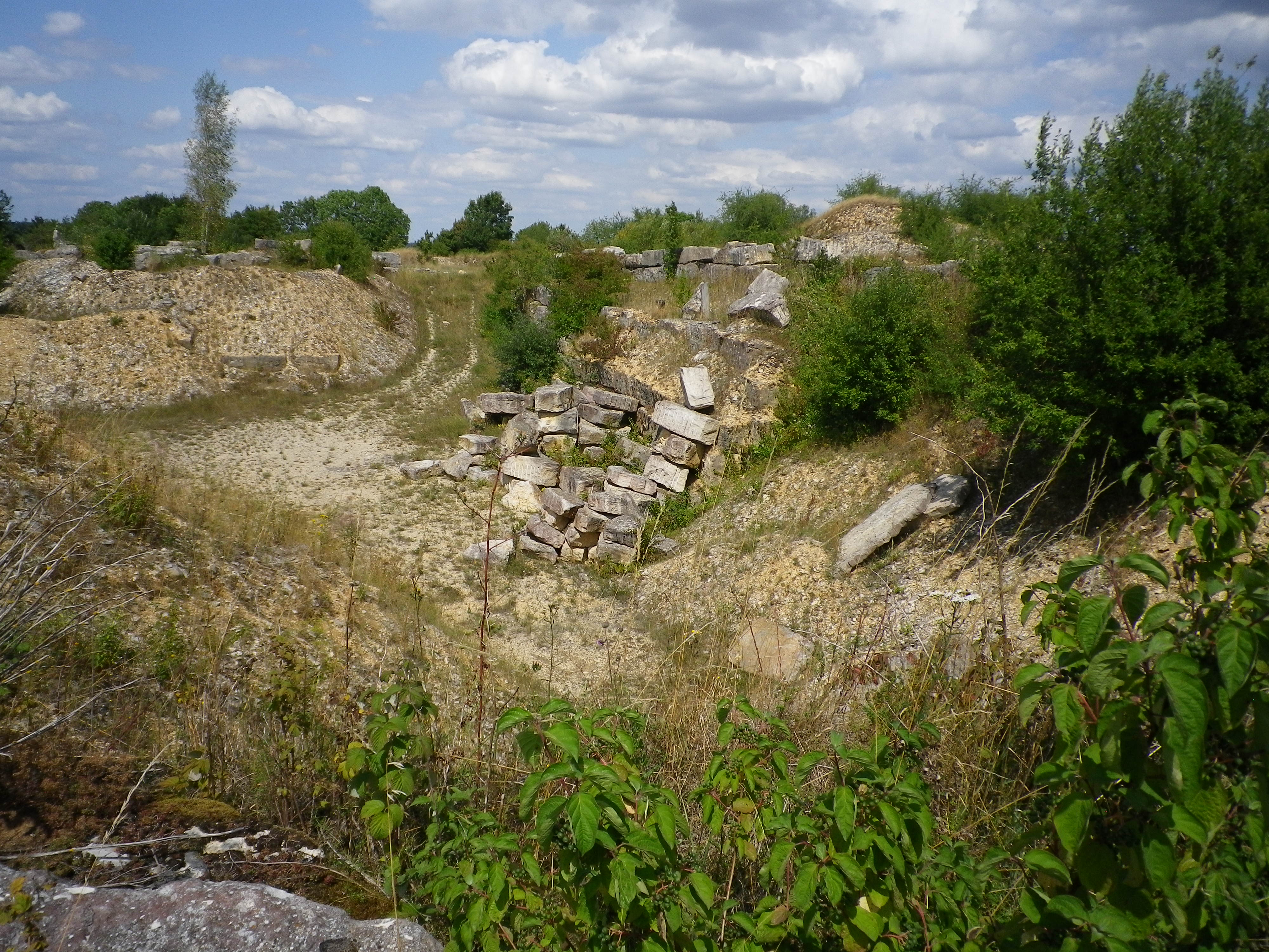 Geotop bei Schernfeld